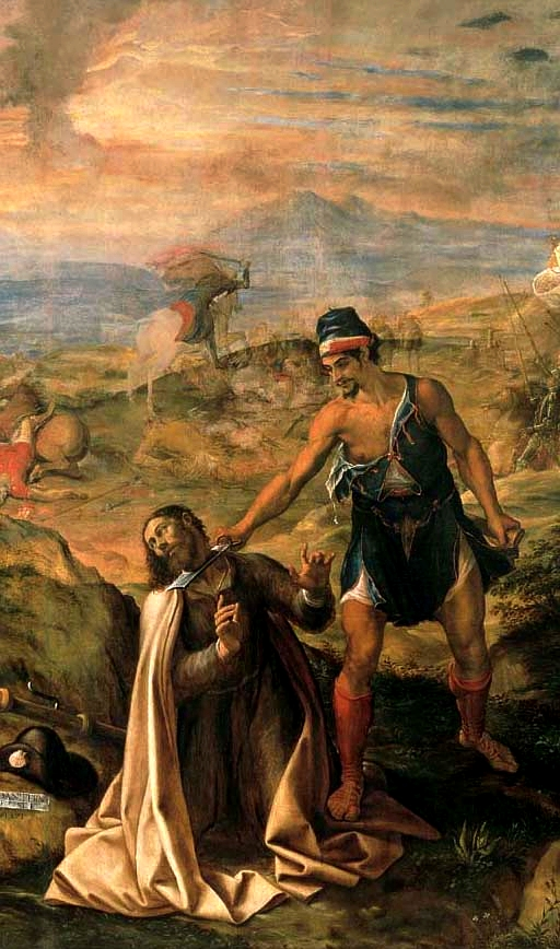 El lienzo representa el martirio del apóstol Santiago el Mayor, que según la tradición murió decapitado en Jerusalén en el año 44 de la era Cristiana por orden del rey Herodes Agripa I.